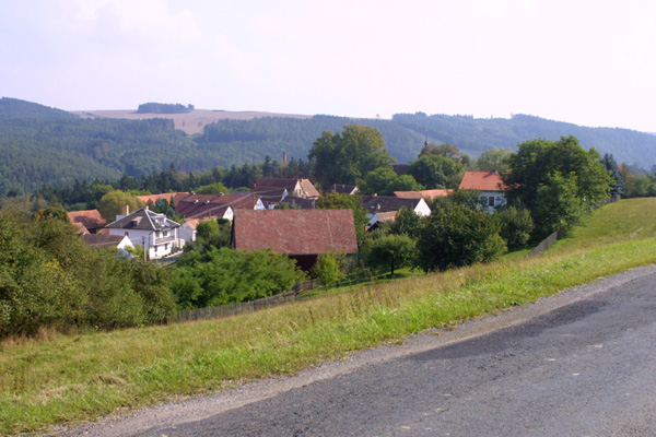 Obec Planá v okrese Plzeň - sever: pohled od severozápadu.